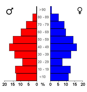 Age pyramids for the 443 municipalities in the Netherlands. Data 2007. Statistics provided by Centraal Bureau voor de Statistiek, Voorburg/Heerlen. Source: Tabel: Bevolking Nederland per gemeente en diverse regio's naar leeftijd, geslacht en burgerlijke staat, 1 januari 1988-2007. Gewijzigd op 24 mei 2007 (on-line database StatLine) Bevolkingspiramide - Gemeente Vught (2007).png